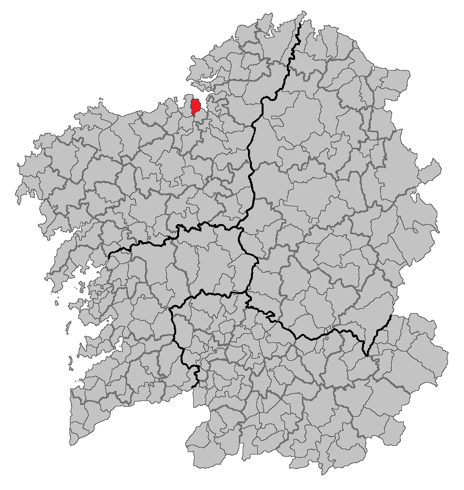 Mapa coa localización do concello de Sada.